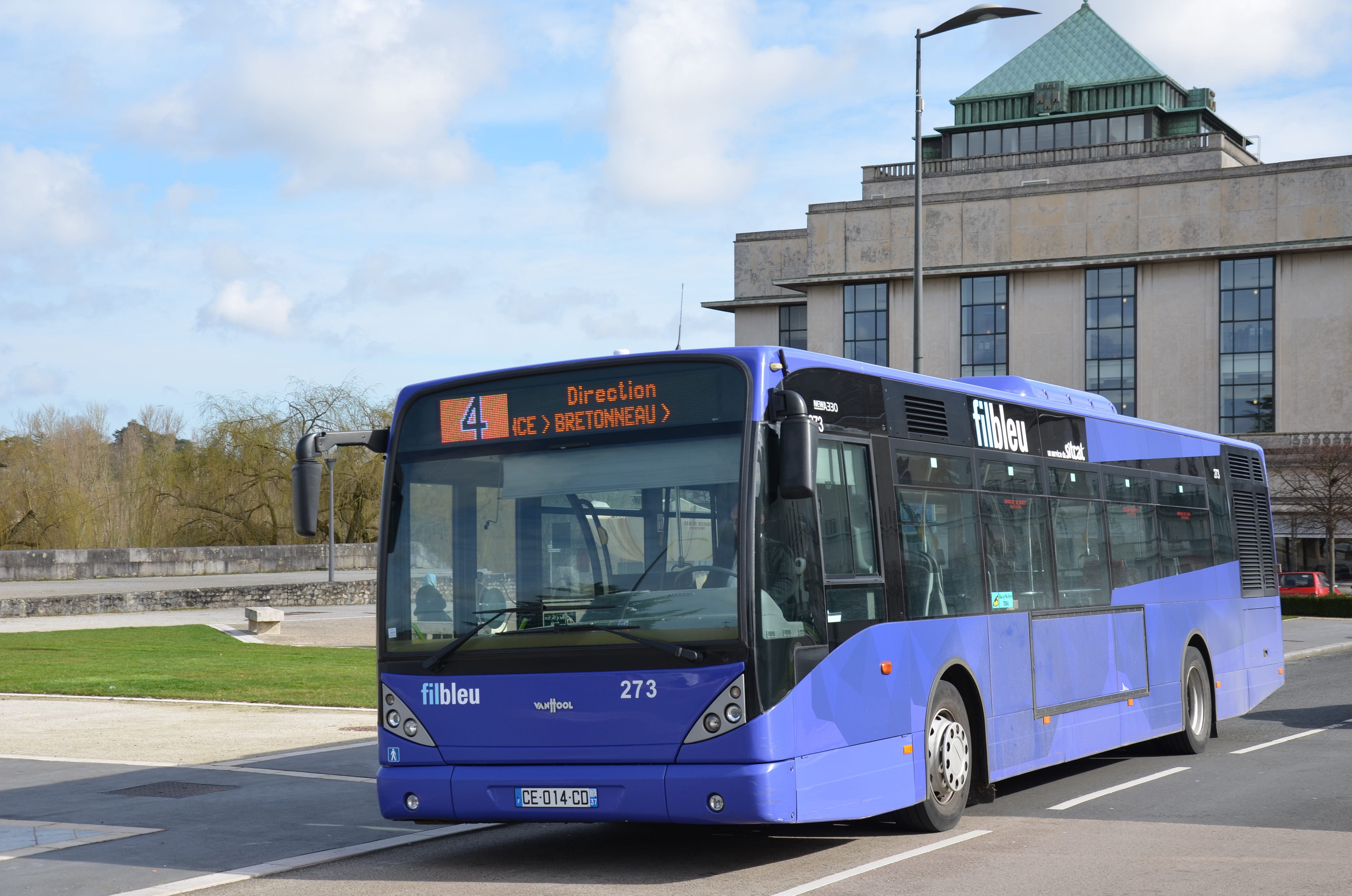 Van Hool NewA330 n°273 aperçu sur la ligne 4 du réseau Fil Bleu de Tours, près de l'arrêt Anatole France.